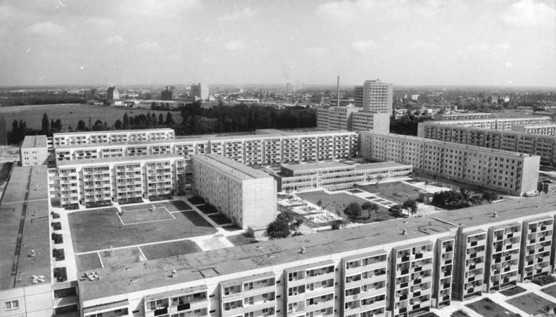 Leipzig, Grünau, Wohnblocks ADN-ZB Gahlbeck 5.6.81 Leipzig: Zweitgrößte Wohnungsbaustelle der DDR ist Leipzig-Grünau. 1975 begannen die ersten Arbeiten. Heute wohnen hier bereits 30.000 Bürger. Bis zum Ende 1981 werden 5 700 Wohnungen entstehen.